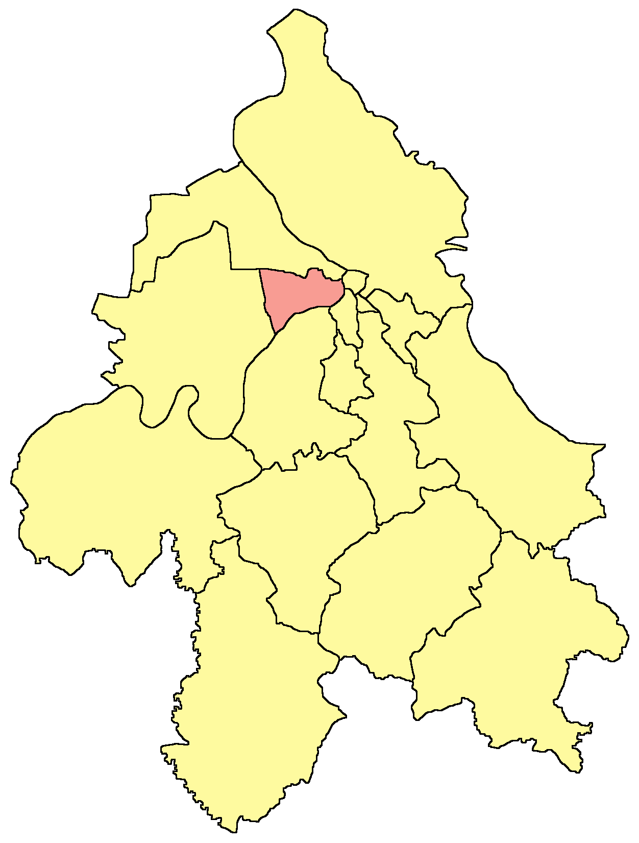 Belgrade municipality map